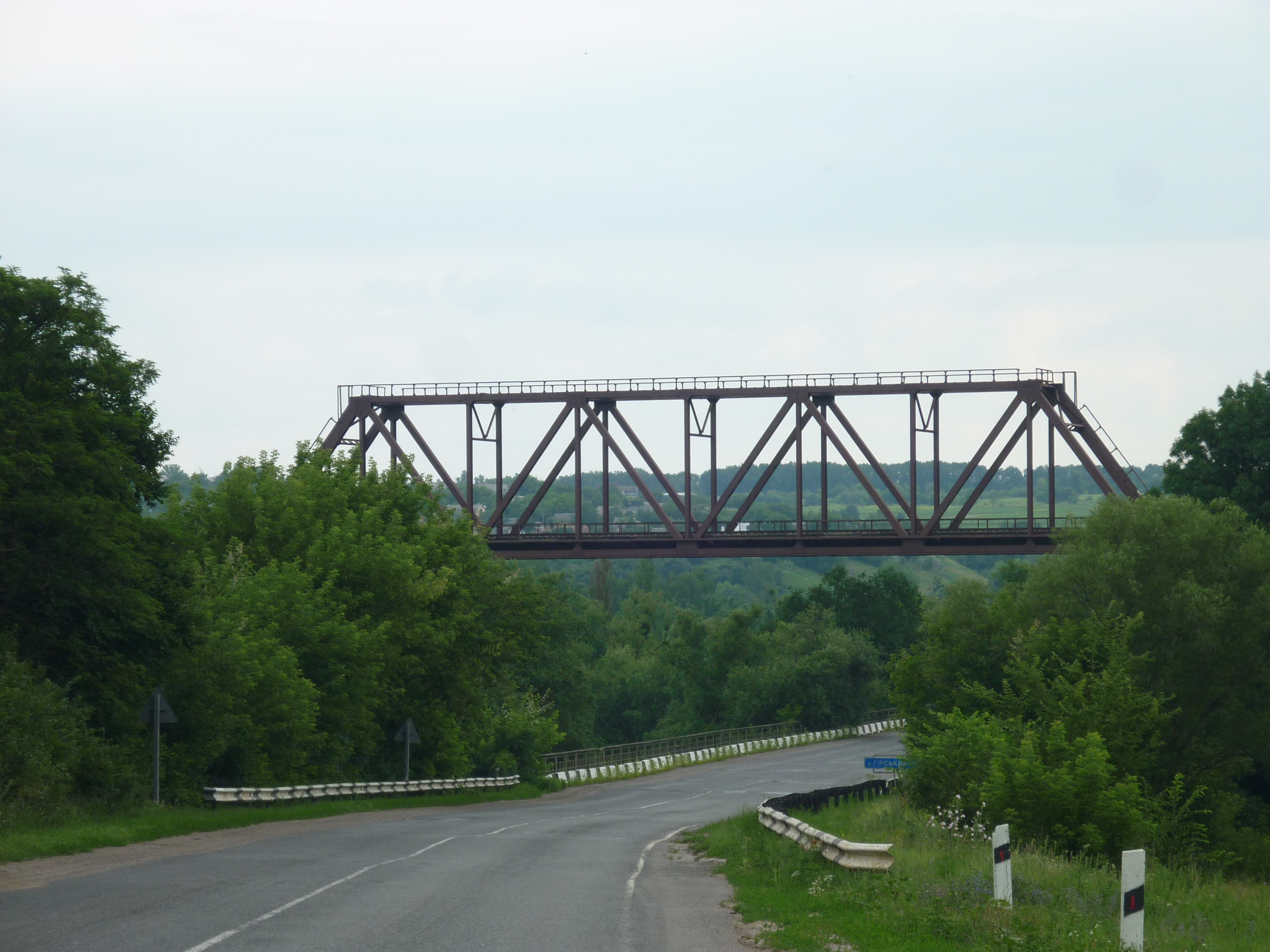 подвійний міст над річкою Гірський Тікич в місті Тальне Черкаської області